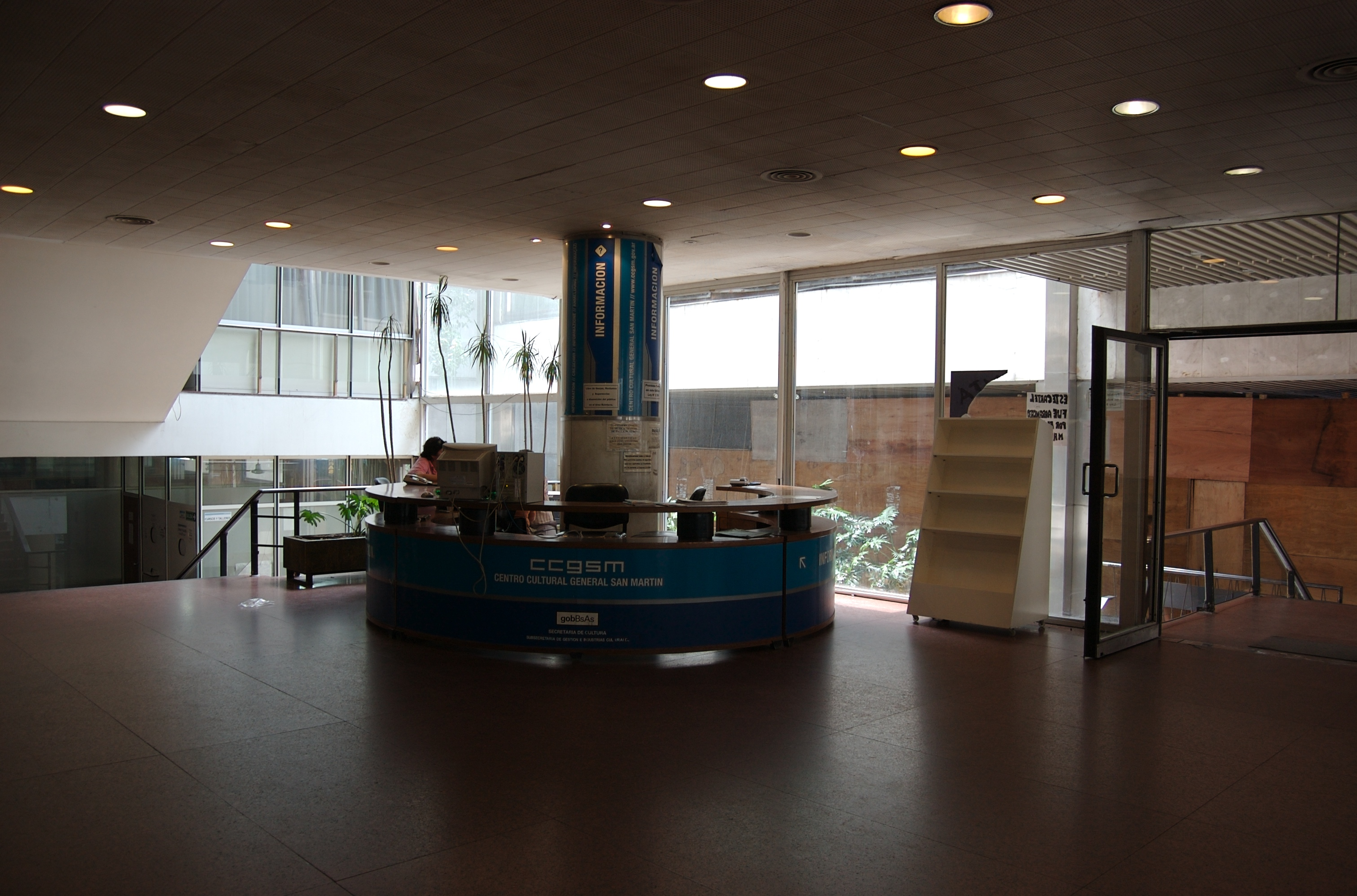 Lobby del Centro Cultural General San Martín, Buenos Aires, Argentina.